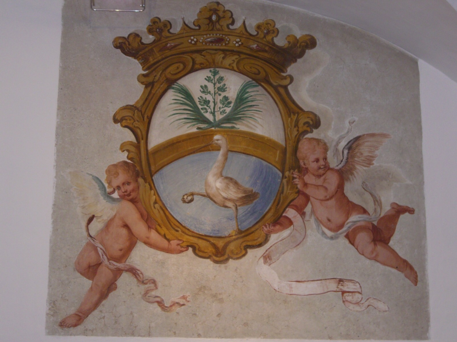 Affresco di Erasmo Antonio Obermüller nel Palazzo Bortolazzi a Vattaro (Altopiano della Vigolana).